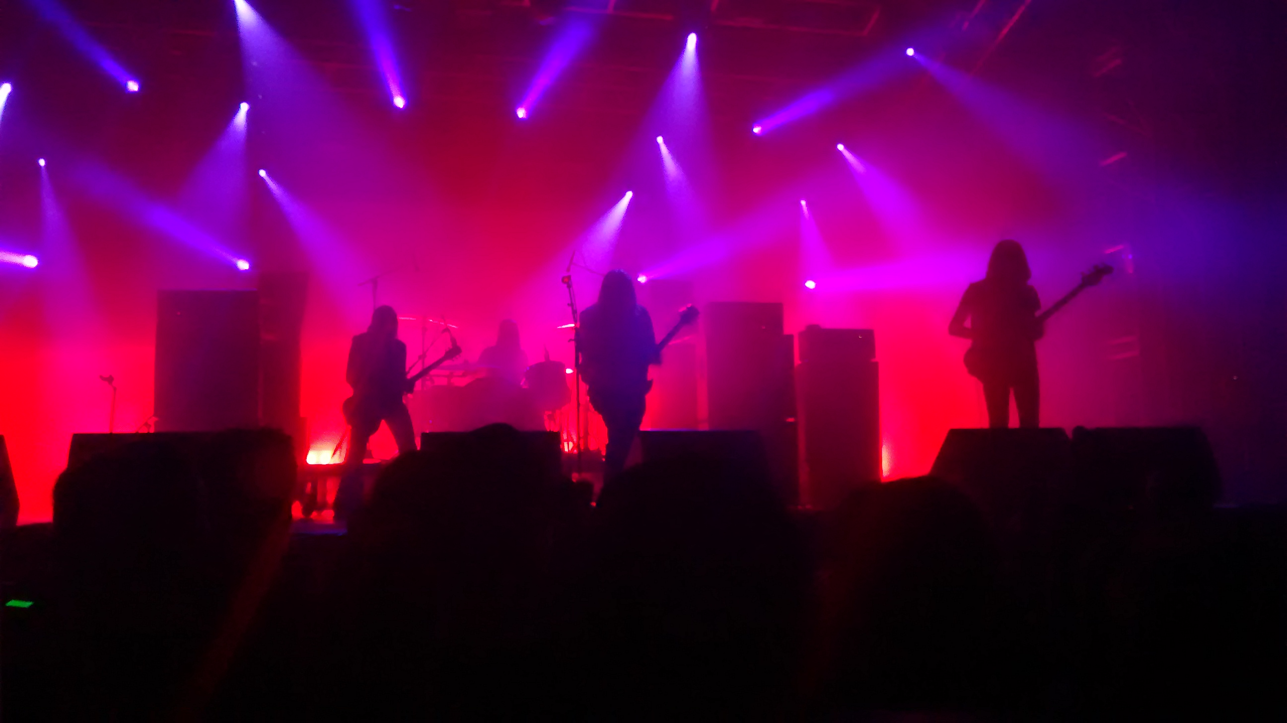 Electric Wizard au Hellfest le 21 juin 2014